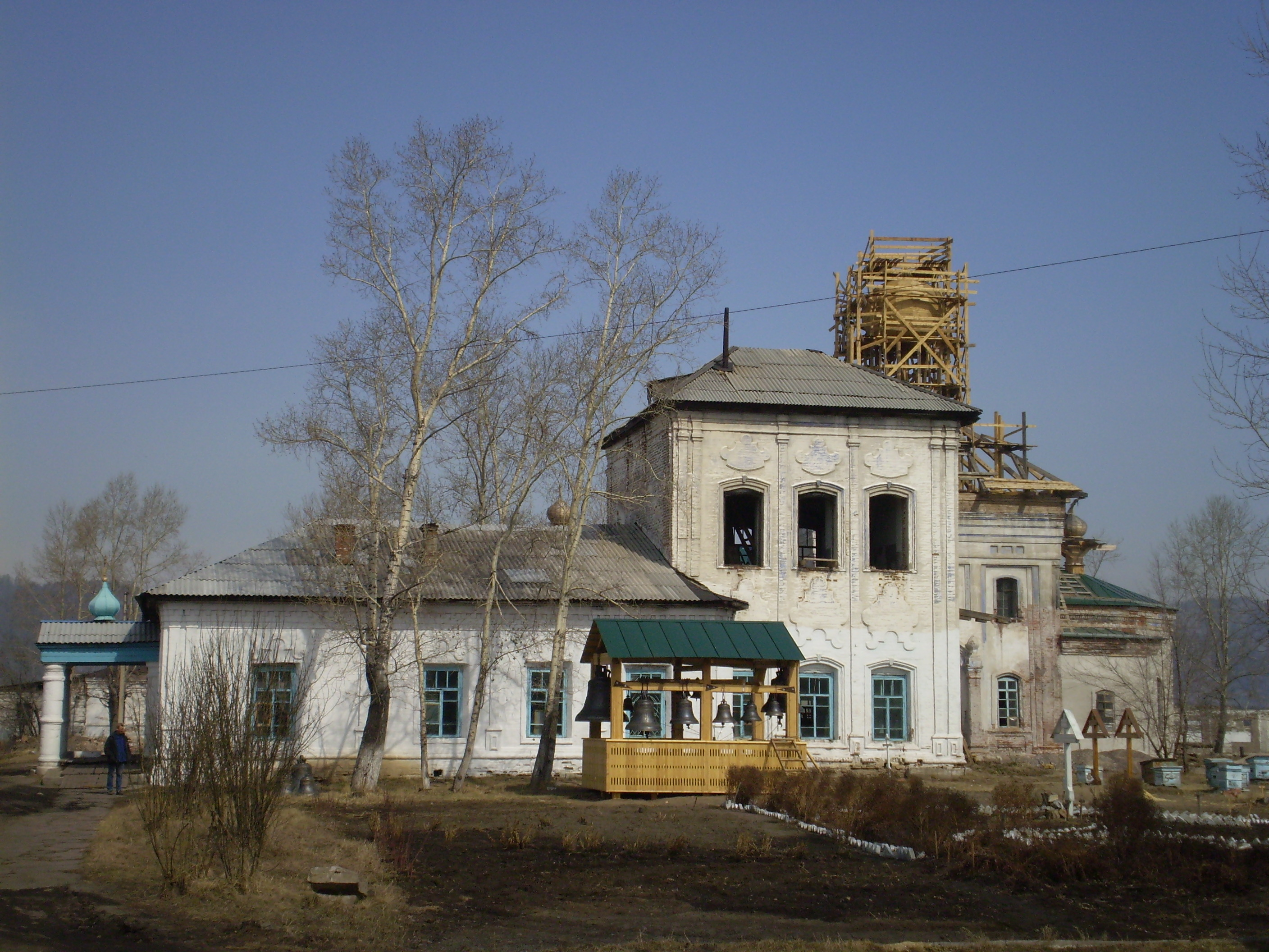 Свято-Троицкий Селенгинский мужской монастырь, Прибайкальский район Бурятии.